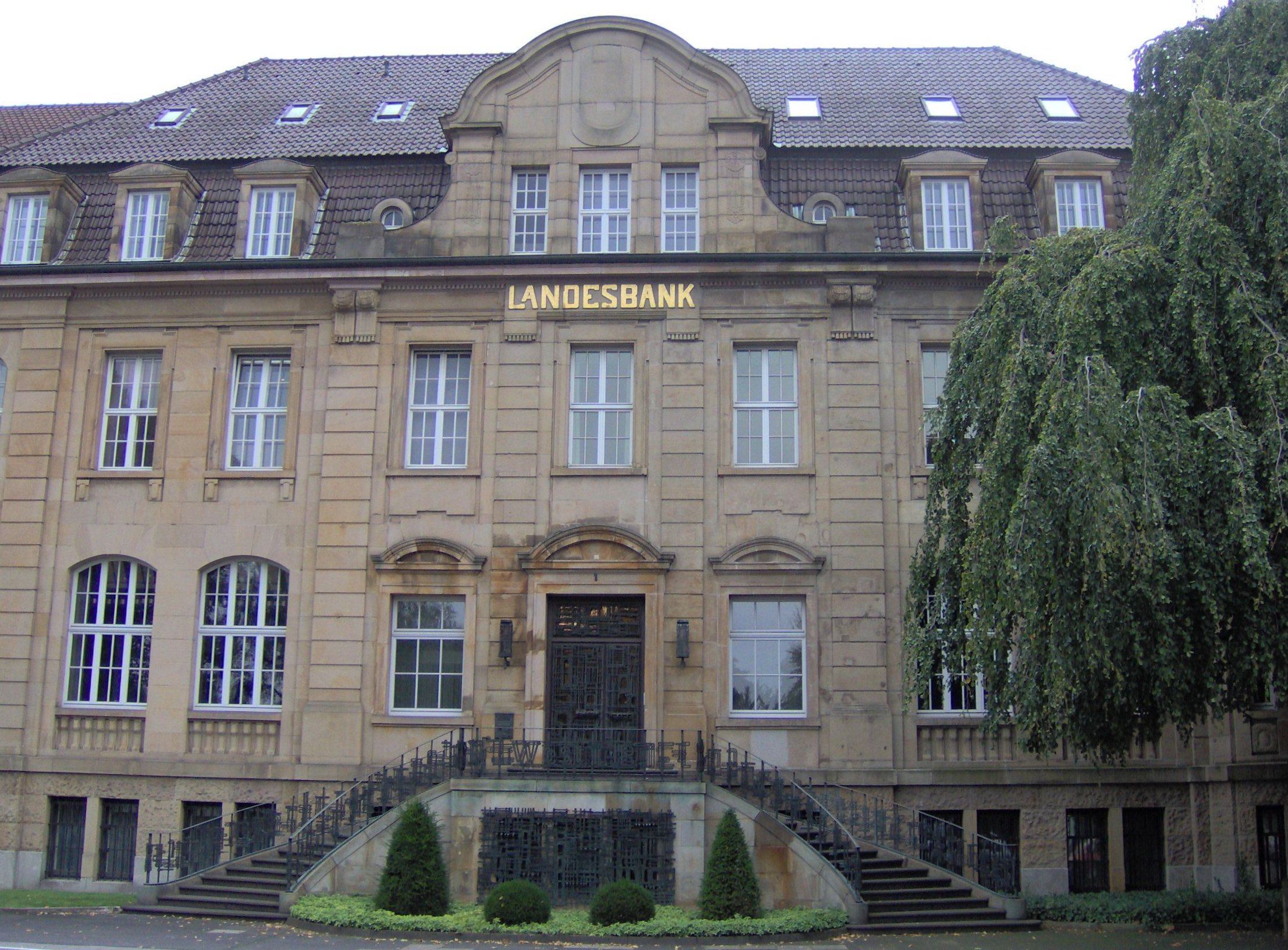 NRW.BANK in Münster.